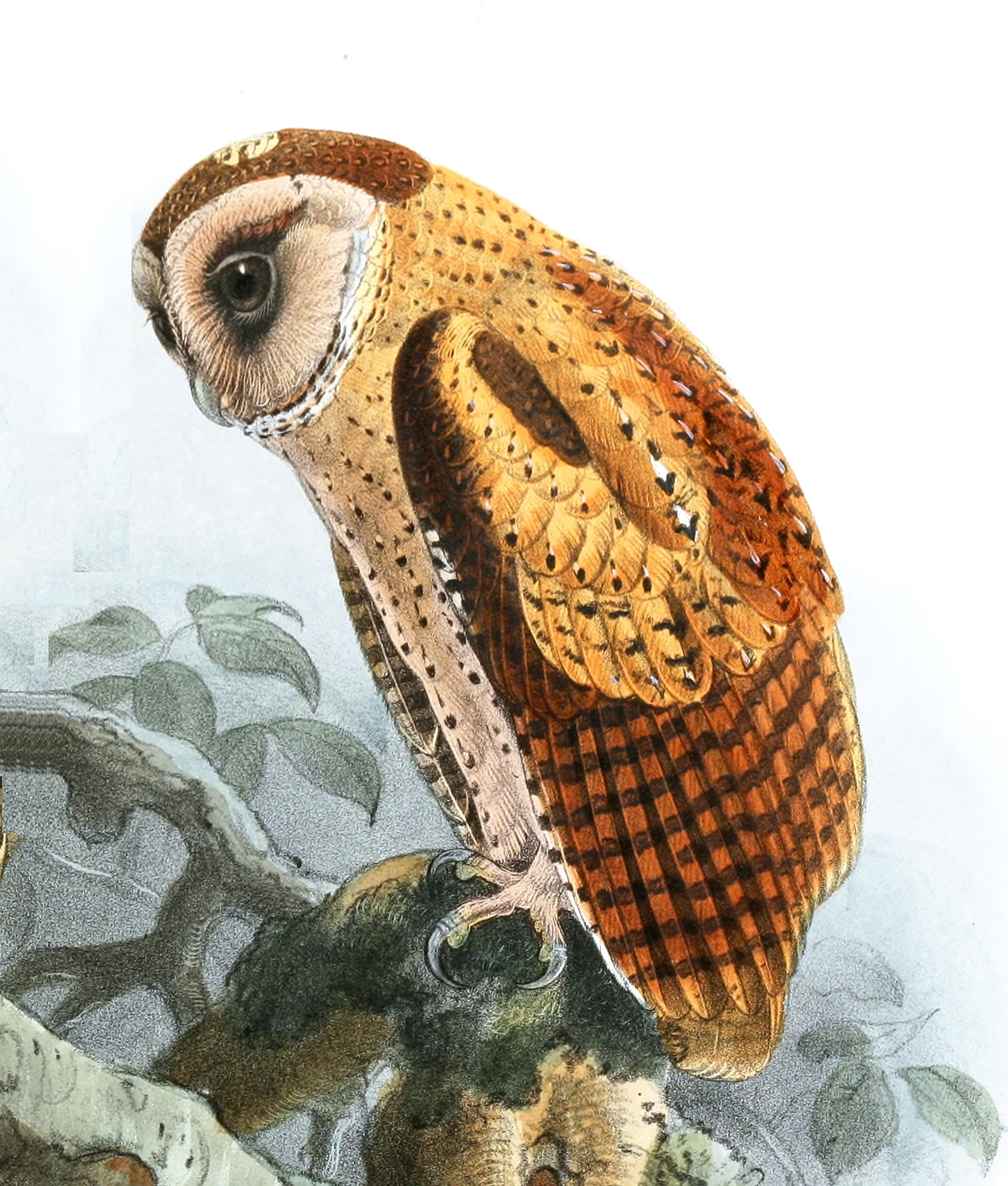 Phodilus assimilis = Phodilus badius assimilis =